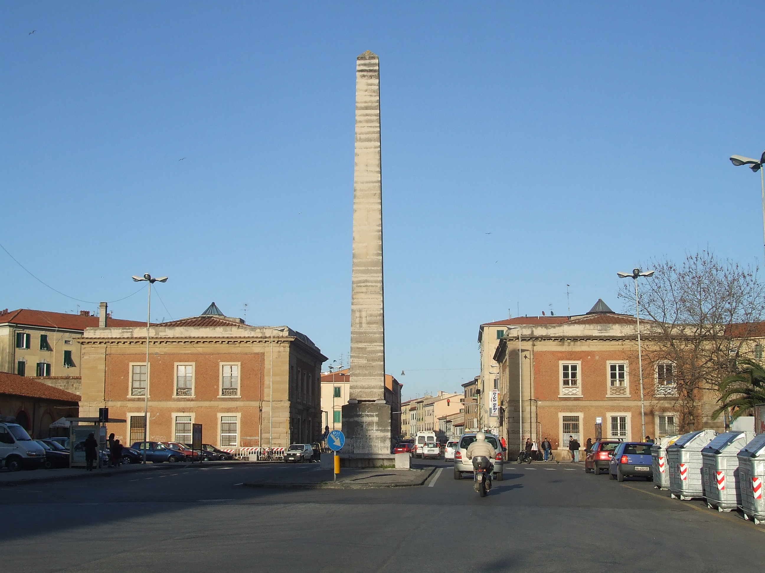 è Stato luogo di scontro tra Austriaci e Livornesi nel 10 e 11 maggio del 1849